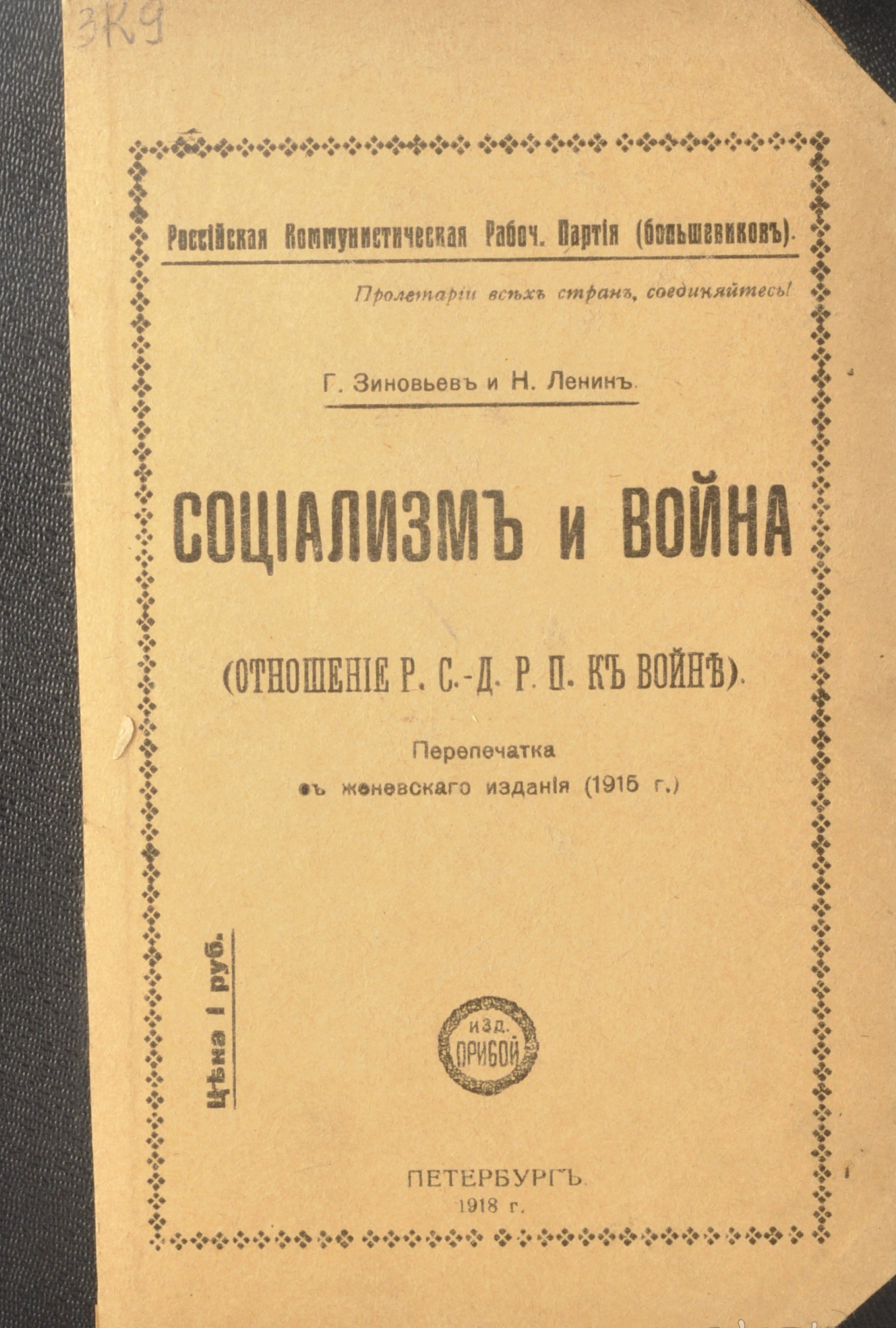 Ленин - Социализм и война (1915/1918, обложка)